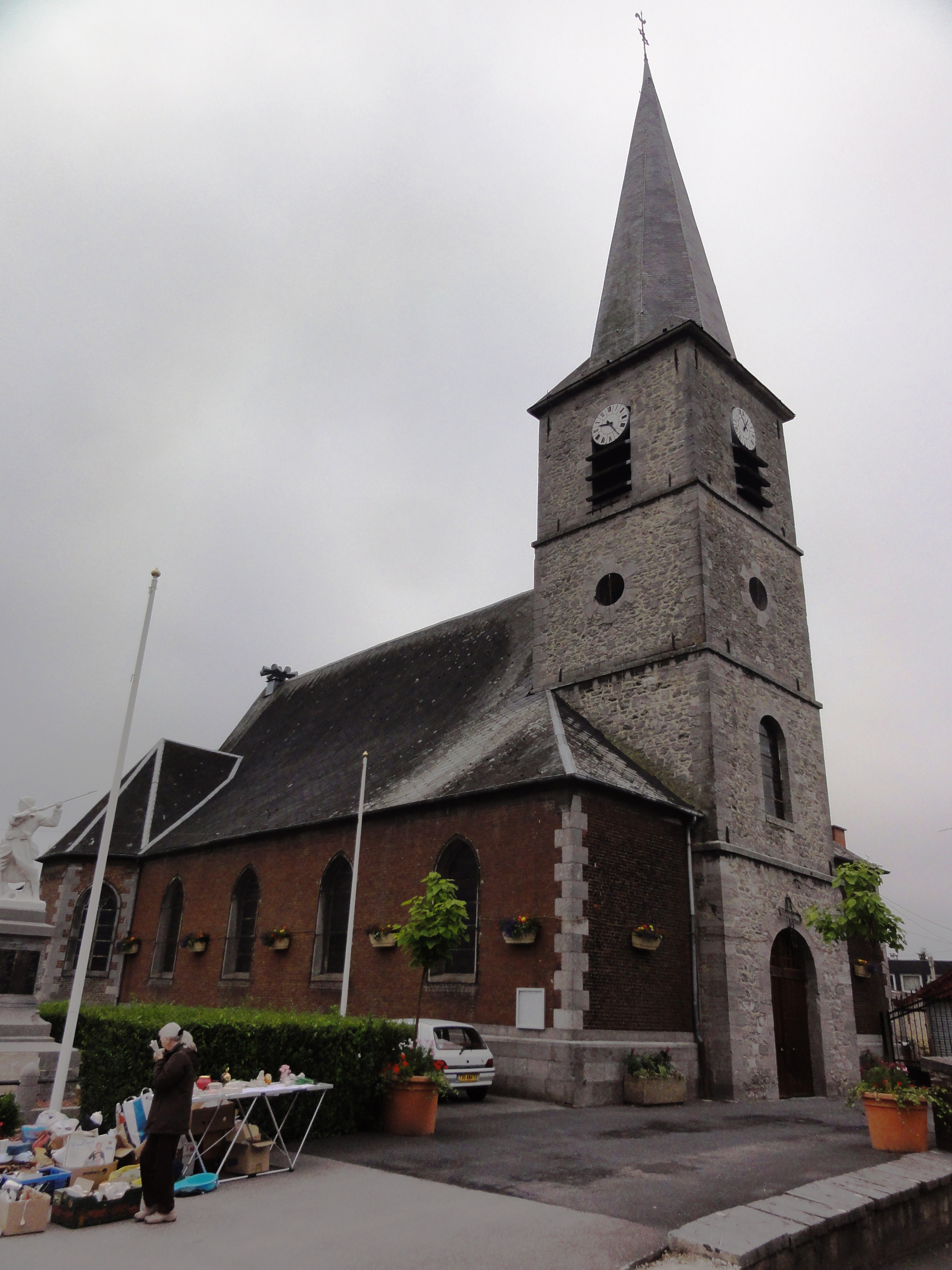 Ferrière-la-Grande (Nord, Fr) église